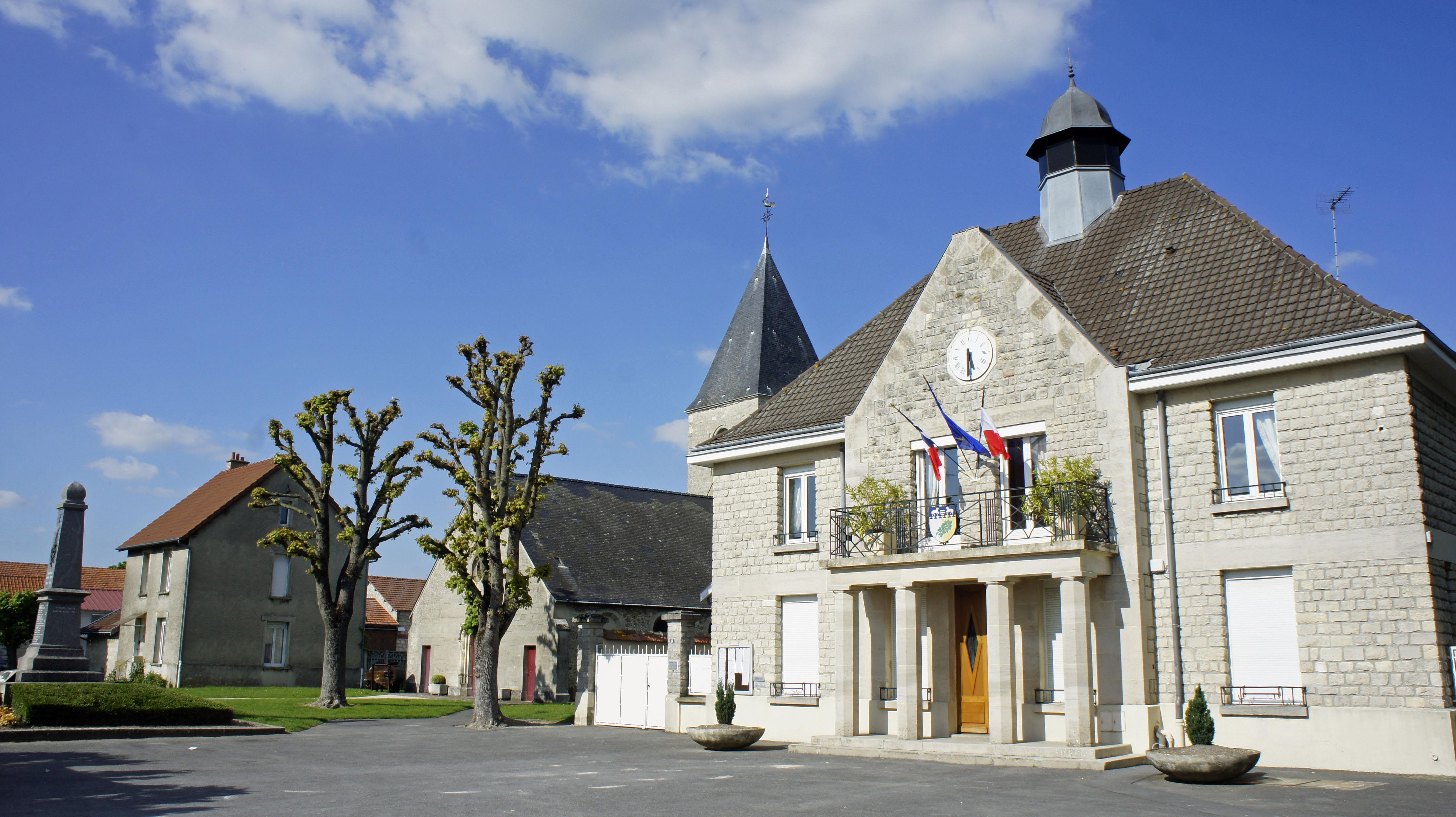 La place du village avec la Mairie, l'église et le monument aux morts de Caurel.